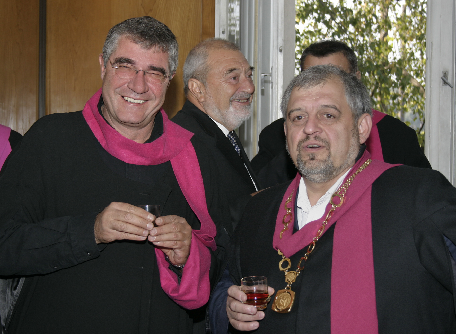 Проф. Пимпирев като част от Академичния съвет на СУ